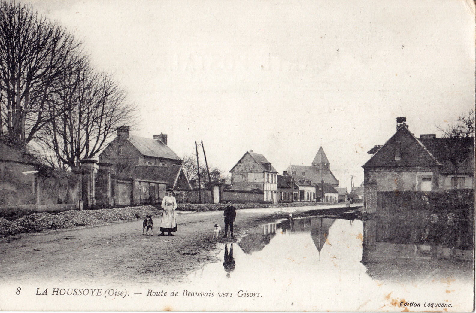 Carte postale ancienne éditée par Lequesne : LA HOUSSOIE - Route de Beauvais vers Gisors